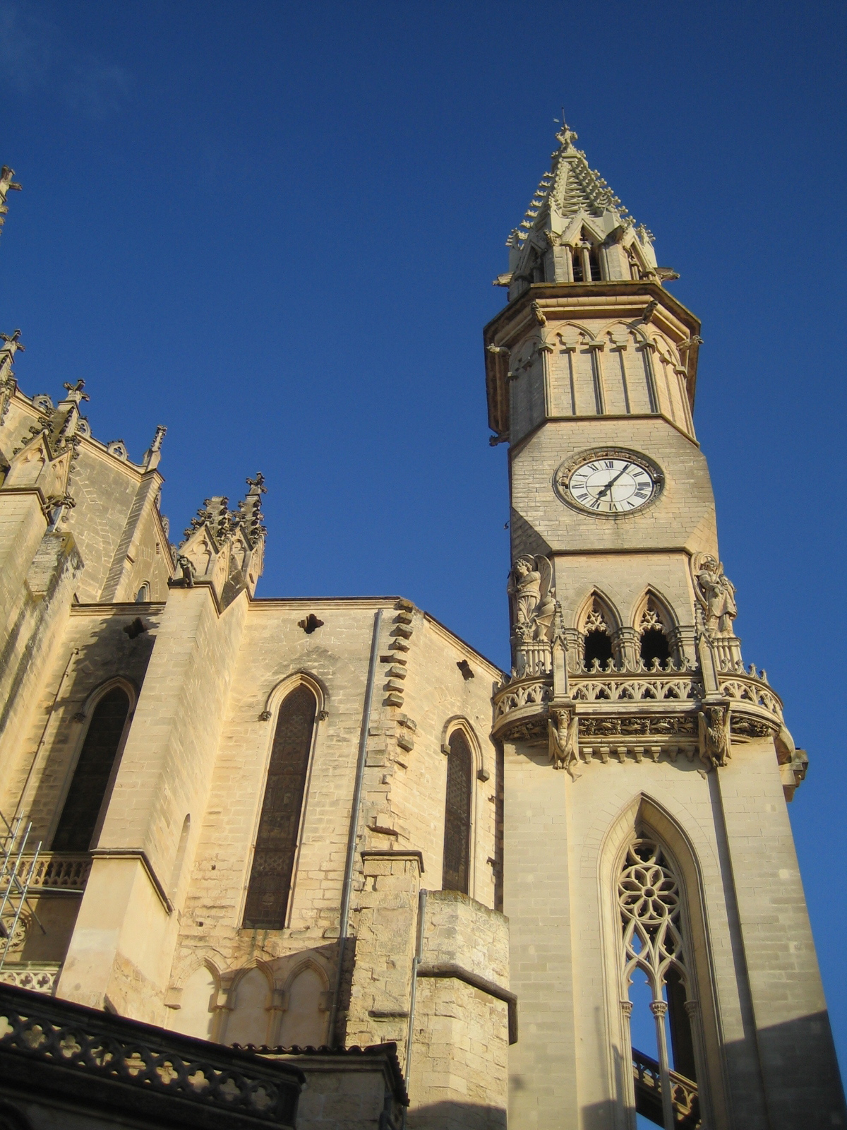 Manacors Pfarrkirche